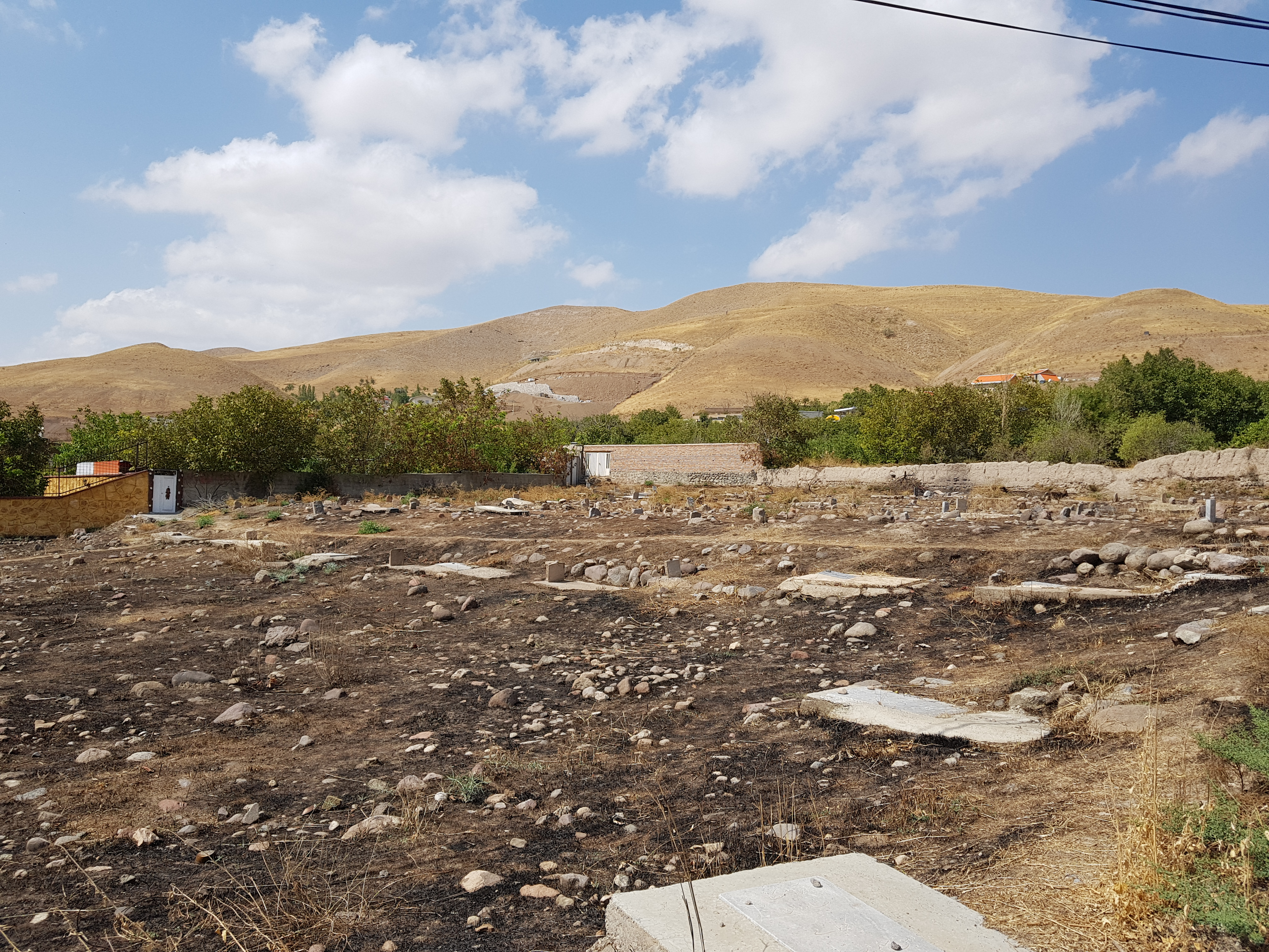 گورستان قدیمی و کوچک روستای اندبیل